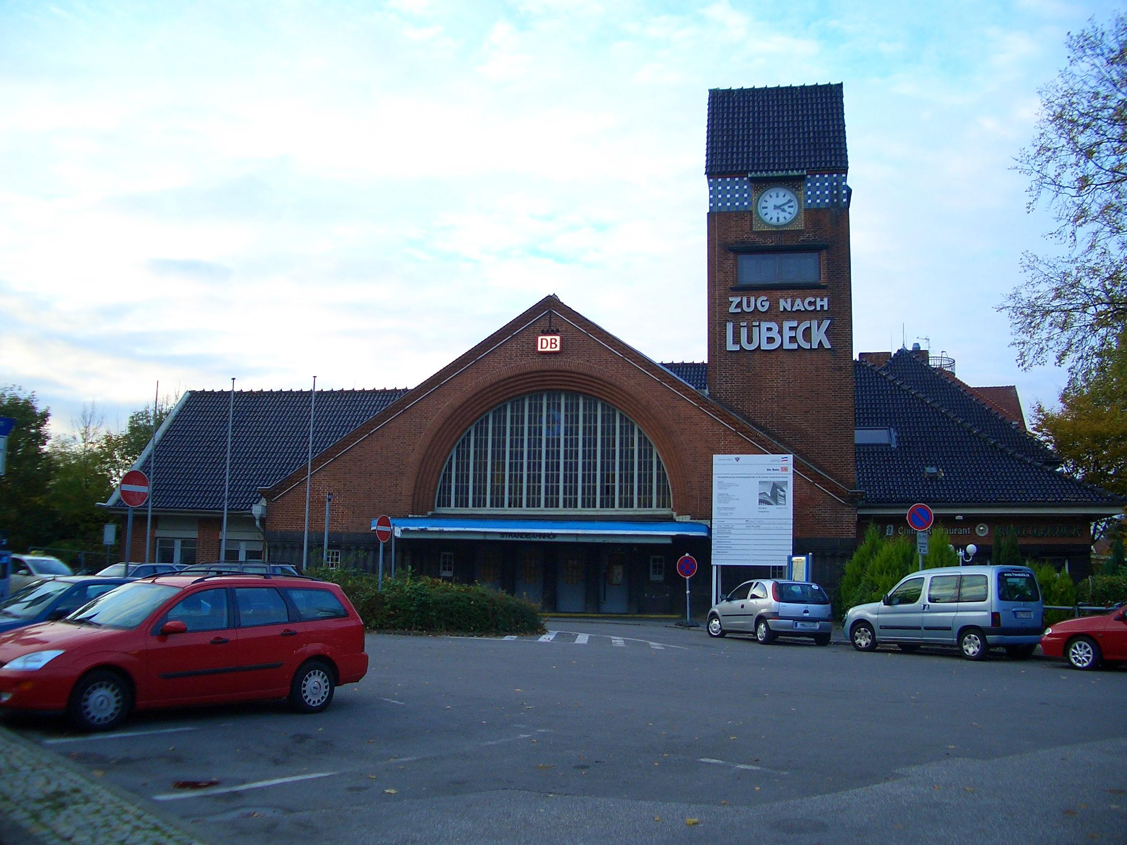 Travemünde, Bahnhof Reinhard Lucas Selber fotografiert